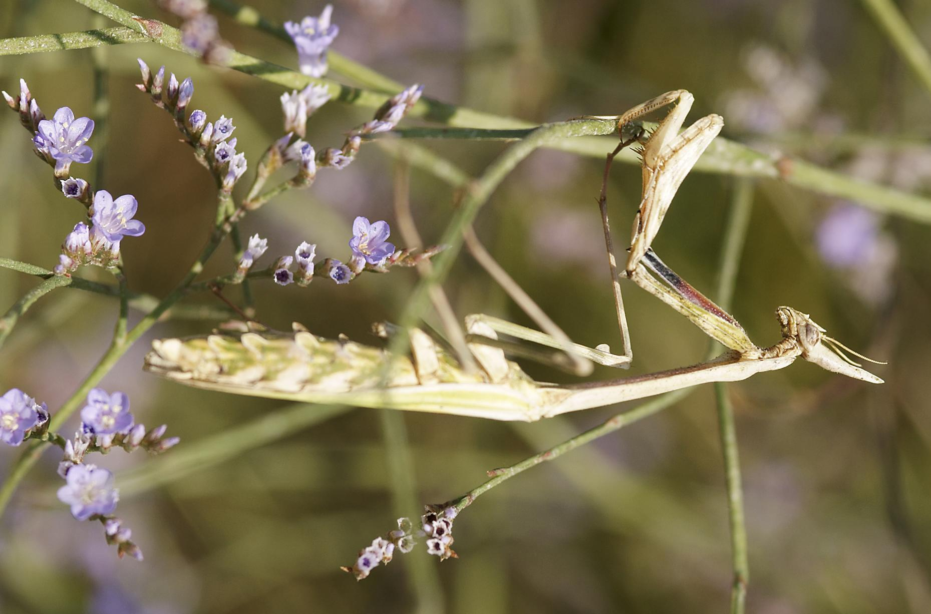 Le tenia ganas a este insecto.